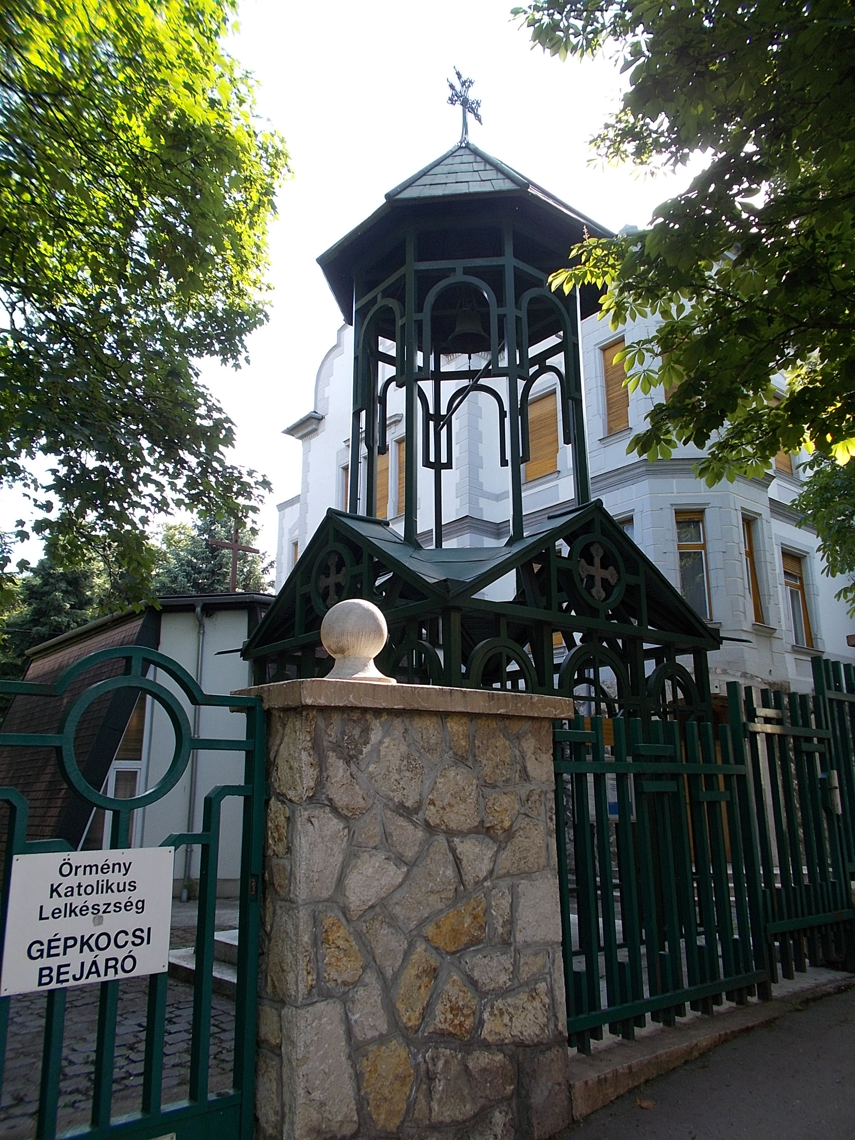 Örmény Katolikus Lelkészség. Harangtorony - Budapest XI. kerület. Orlay u. 6